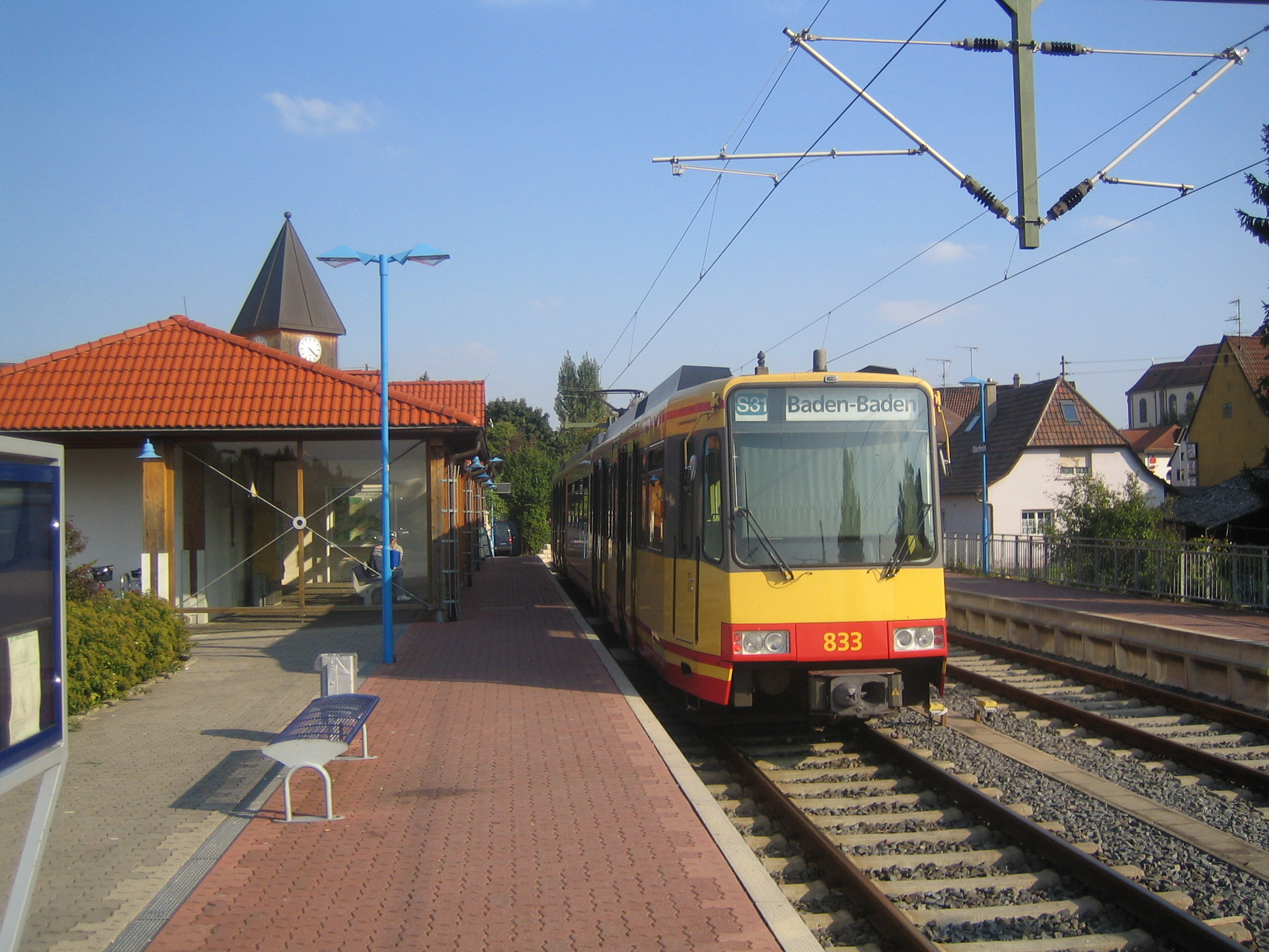 Stadtbahn im Bf. Odenheim